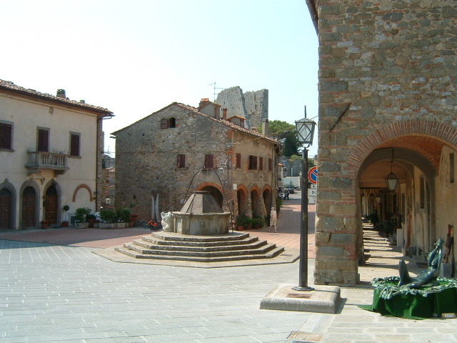 La piazza davanti alla chiesa di Santa Maria Assunta a Civitella in Val di Chiana. Fonte: ResistenzaToscana.it. Licenza cc-by indicata esplicitamente sul sito. Autore della foto Giovanni Baldini.